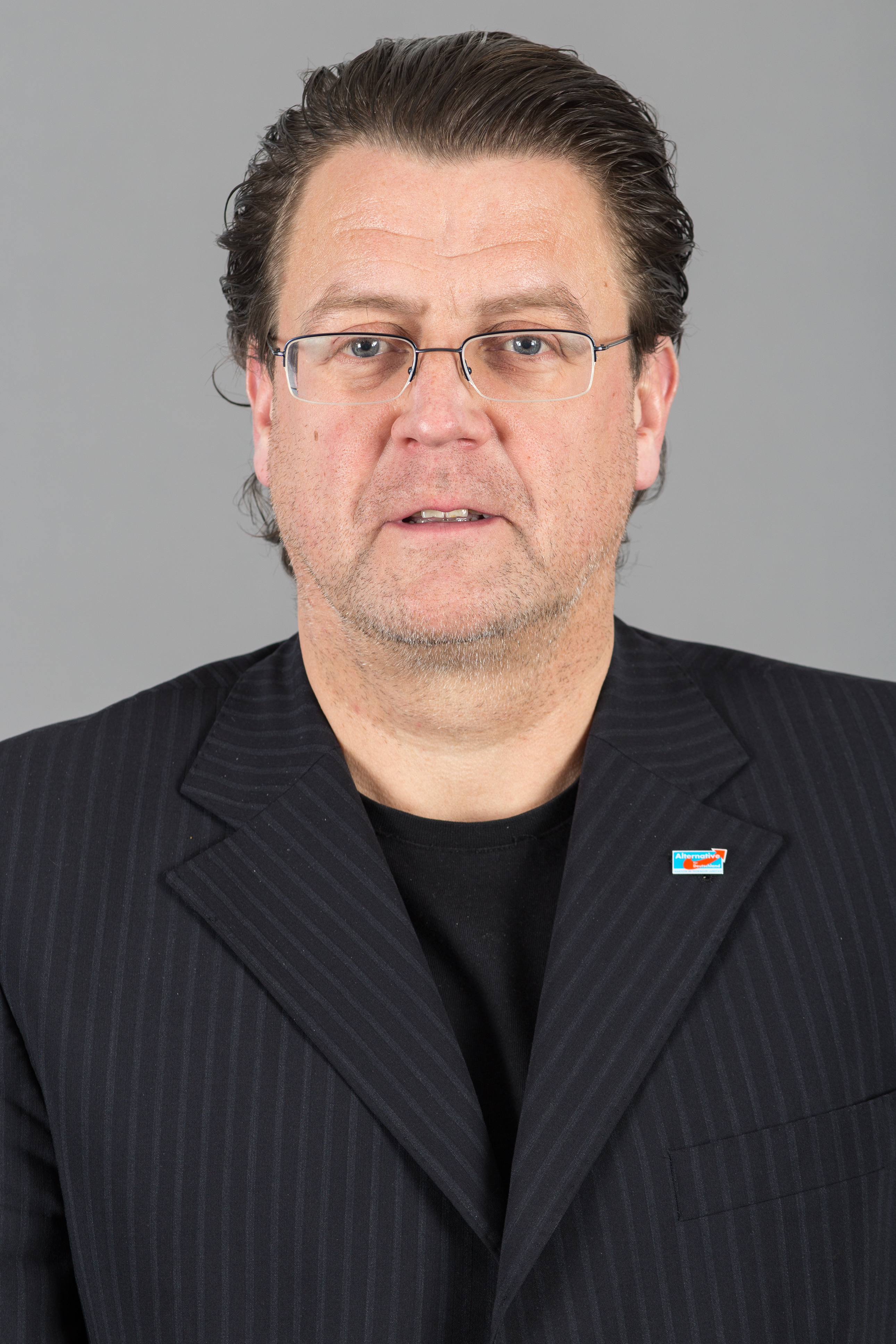 Stephan Brandner